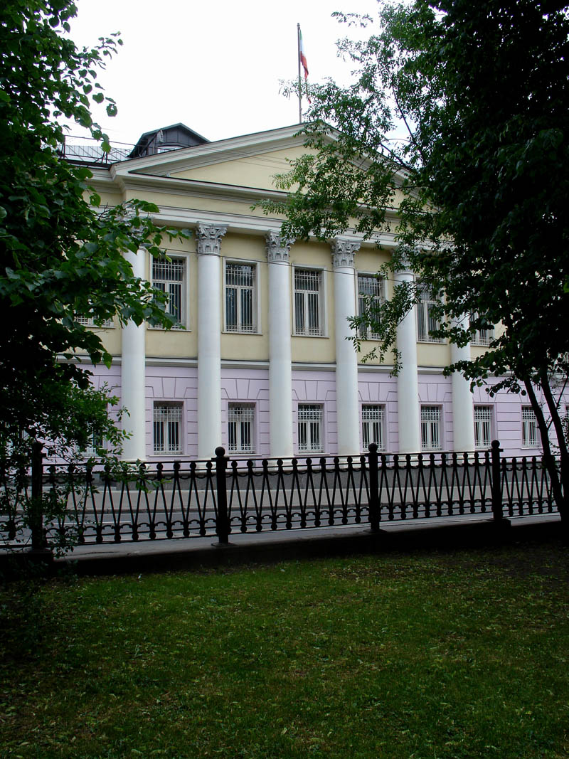 Moscow, Pokrovsky Boulevard 9 RUSSIAN: Москва. Покровский бульвар, 9